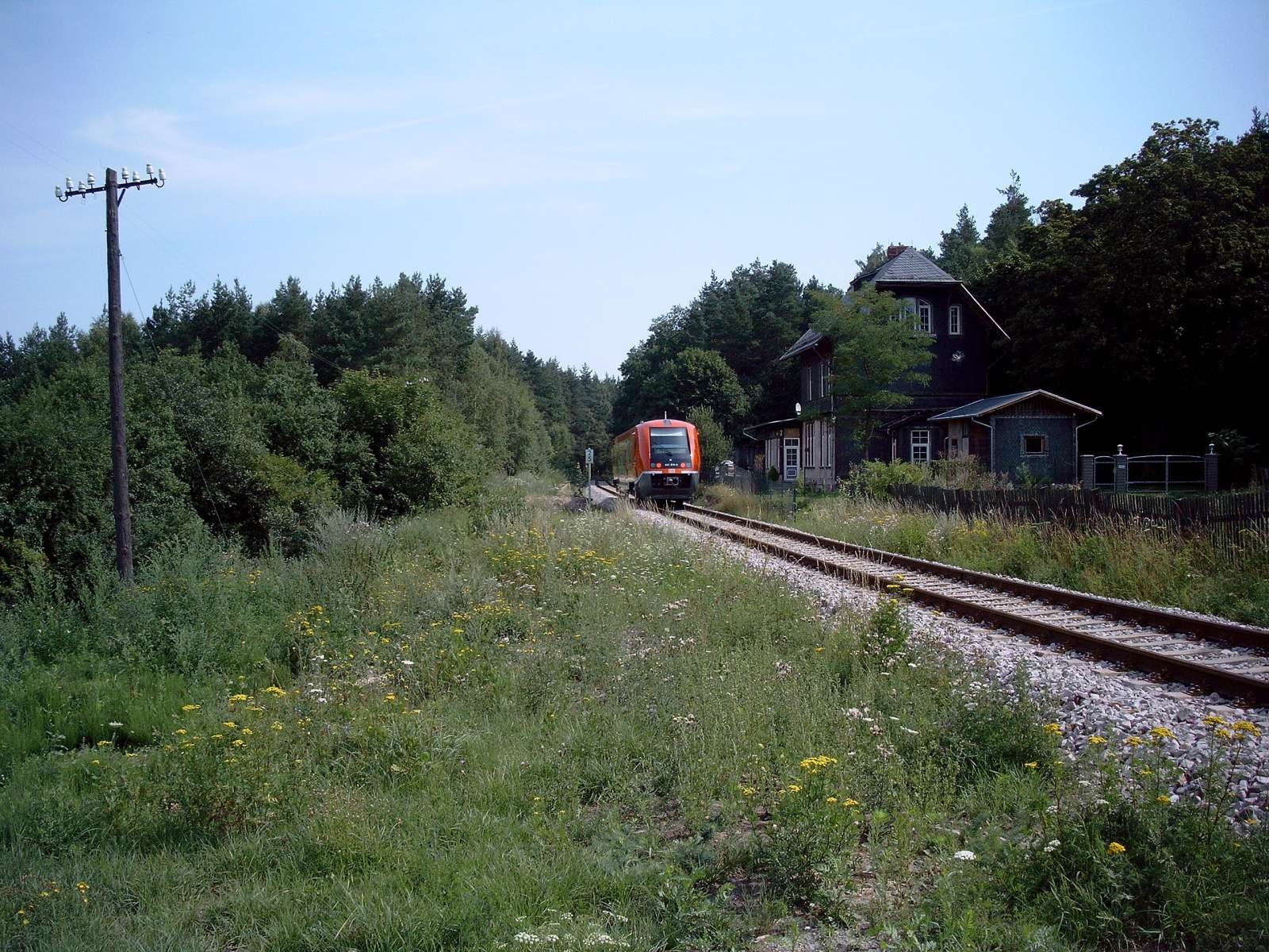 Bahnhof Köditzberg im Rinnetal, Unterköditz, Königsee, Thüringen, Deutschland.